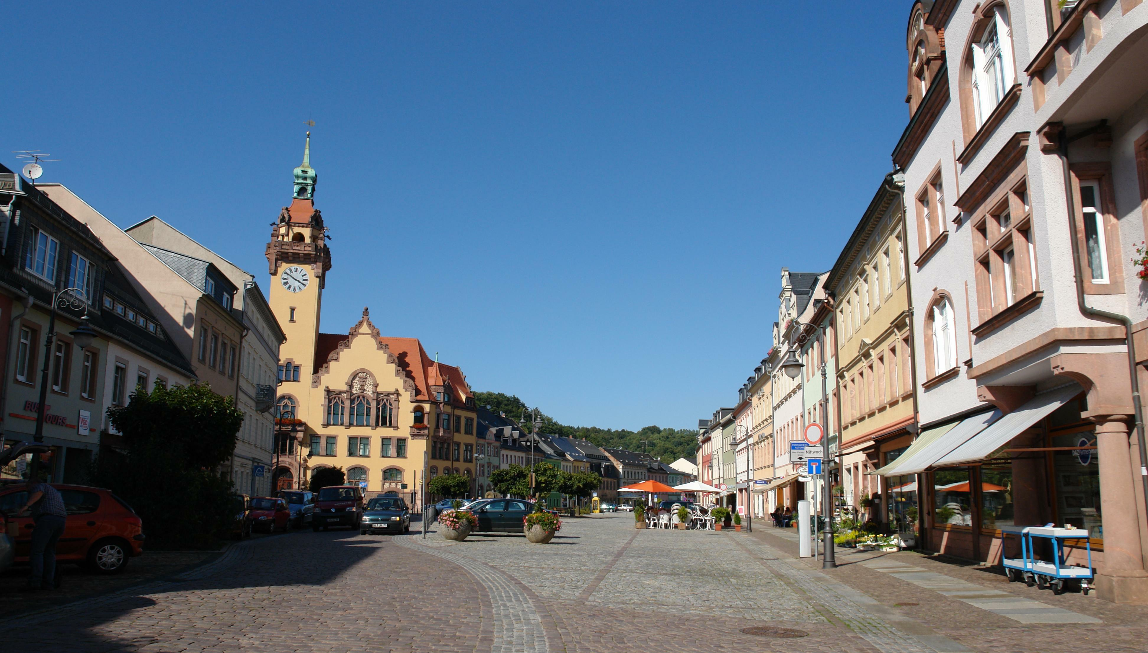 Markt in Waldheim